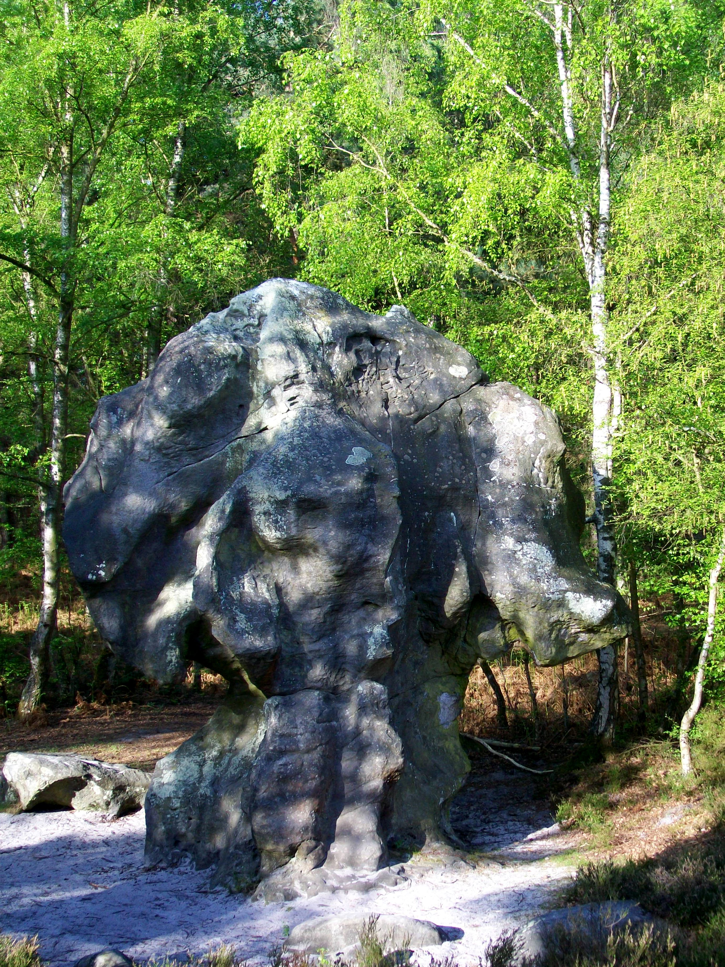 La pierre au Coq, curieuse formation naturelle, bloc de grès, dans le bois du Roi sur la commune d'Ormoy-Villers.